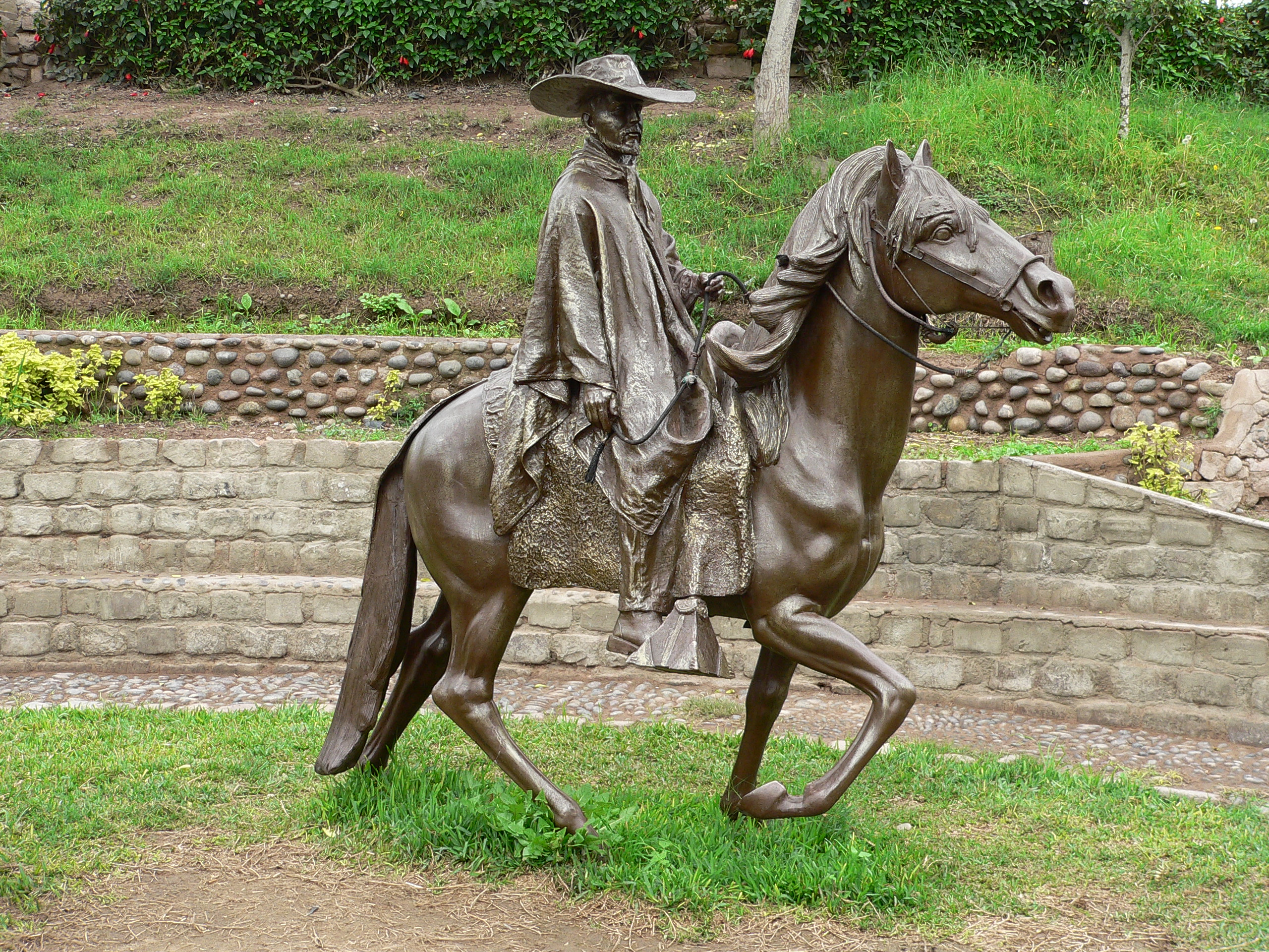 Estatua de caballo peruano de paso. Foto tomada por Manuel González Olaechea y Franco